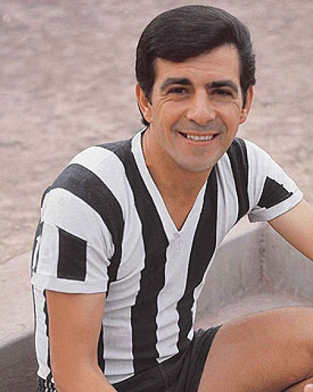 Victor A. Legrotaglie - Gimnasia (Mendoza) - (1971)